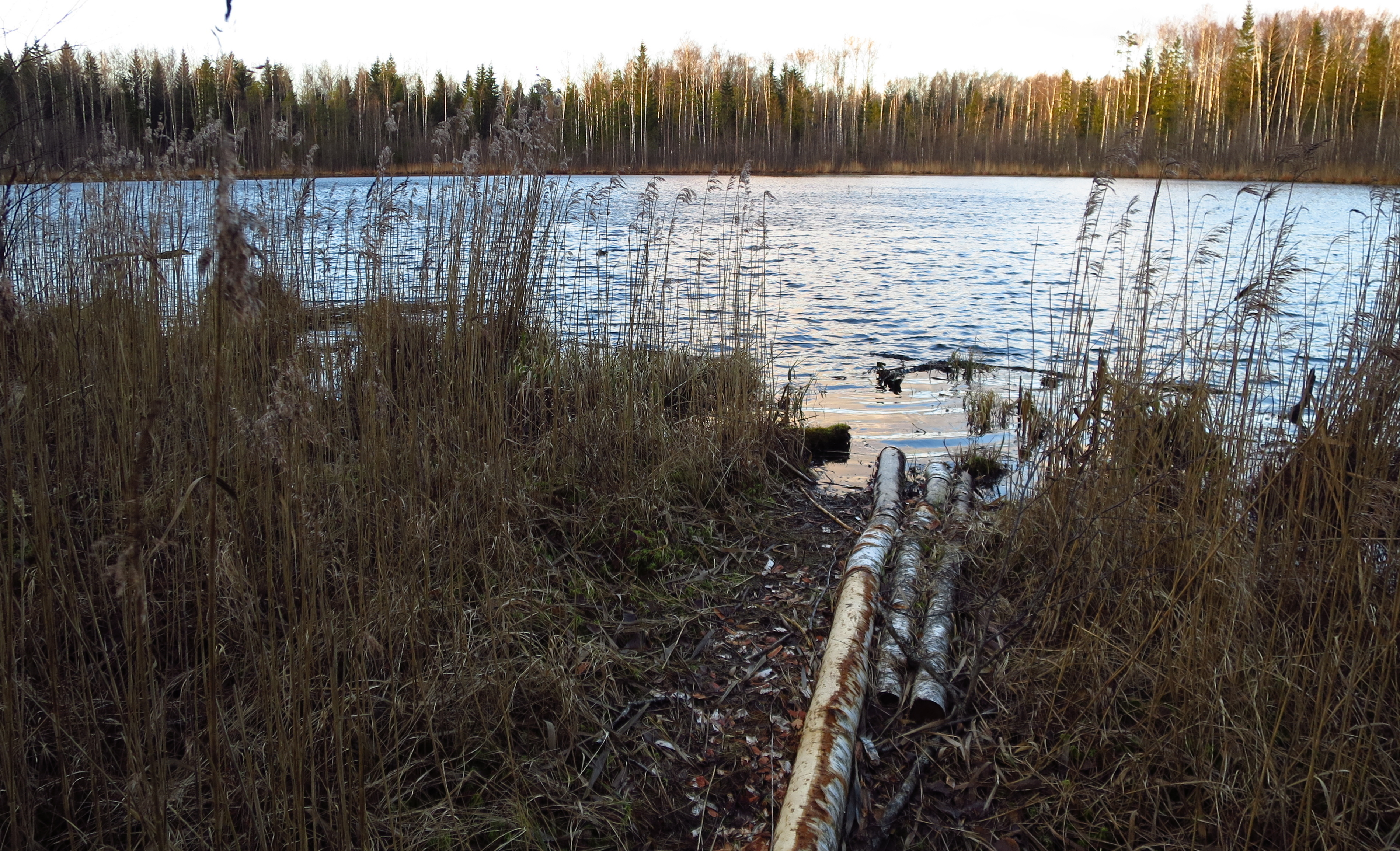 Kurtna Virtsiku järv